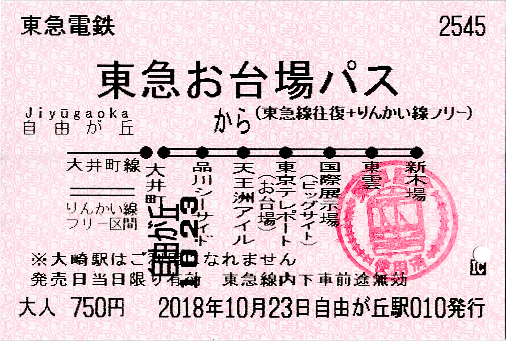 東急電鉄発行 東急お台場パス